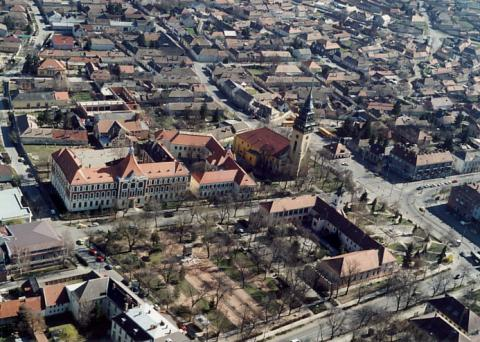 Nagykőrös, Hungary, aerialphotography